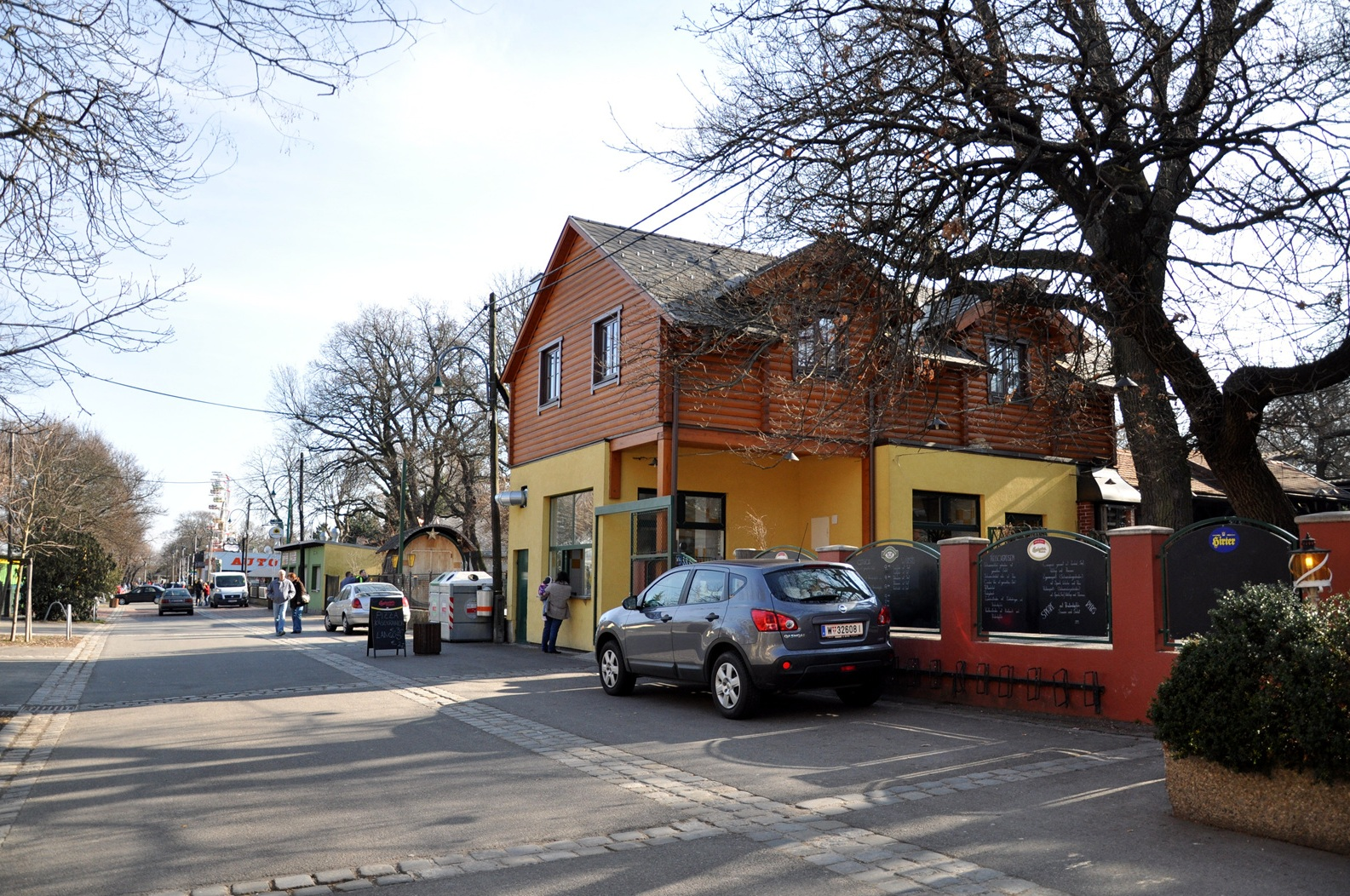 Böhmischer Prater